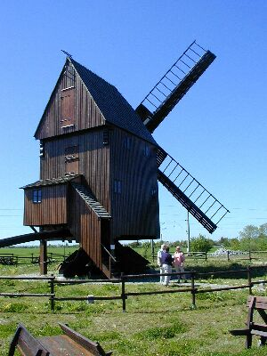 Bockwindmühle in Hohenroda in Sachsen